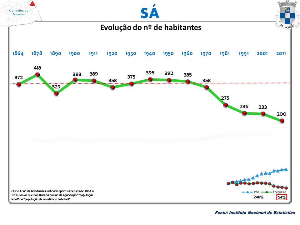 Censos 1864/2011